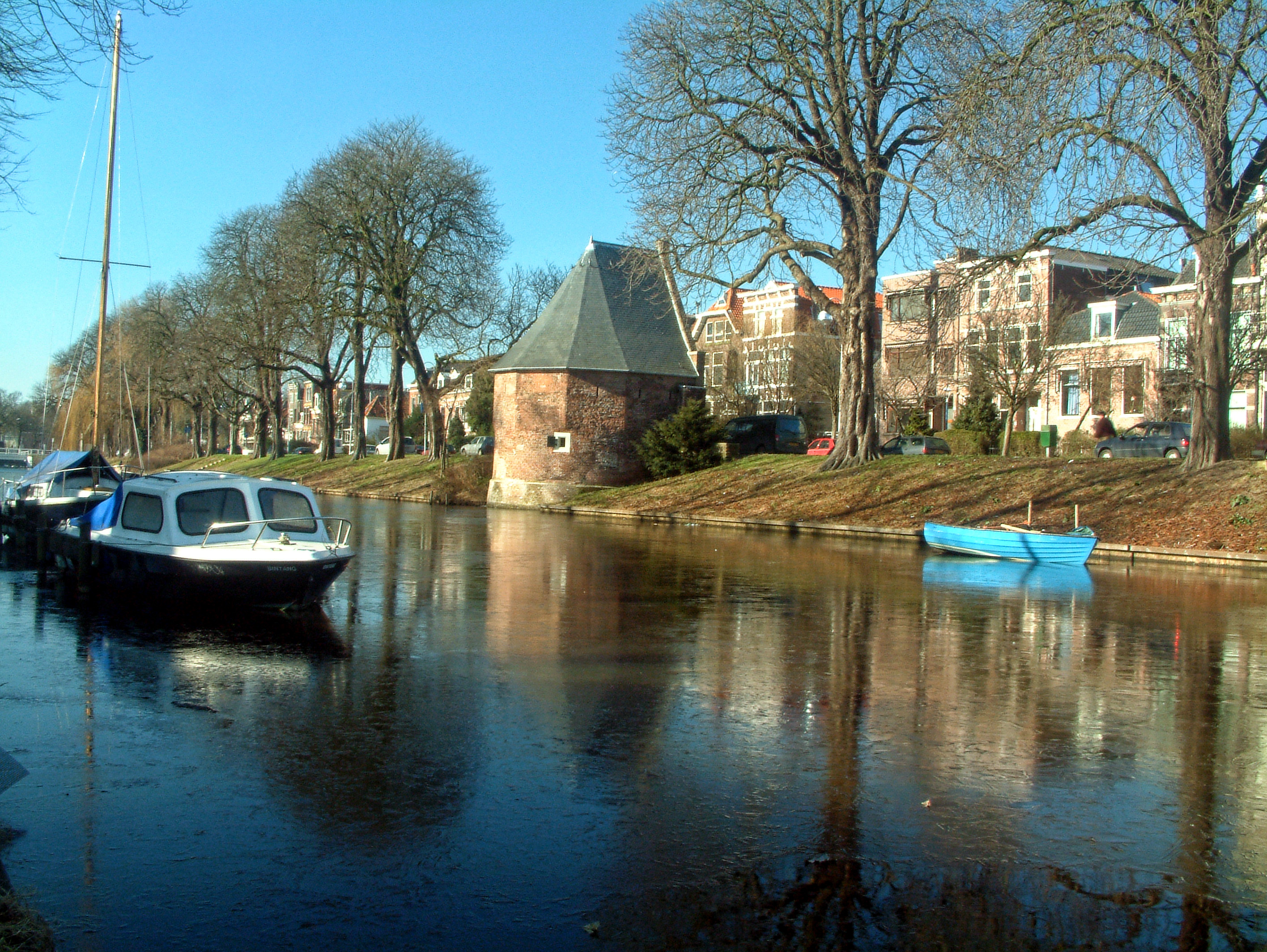 Muurtoren Oostenrijk, Leiden